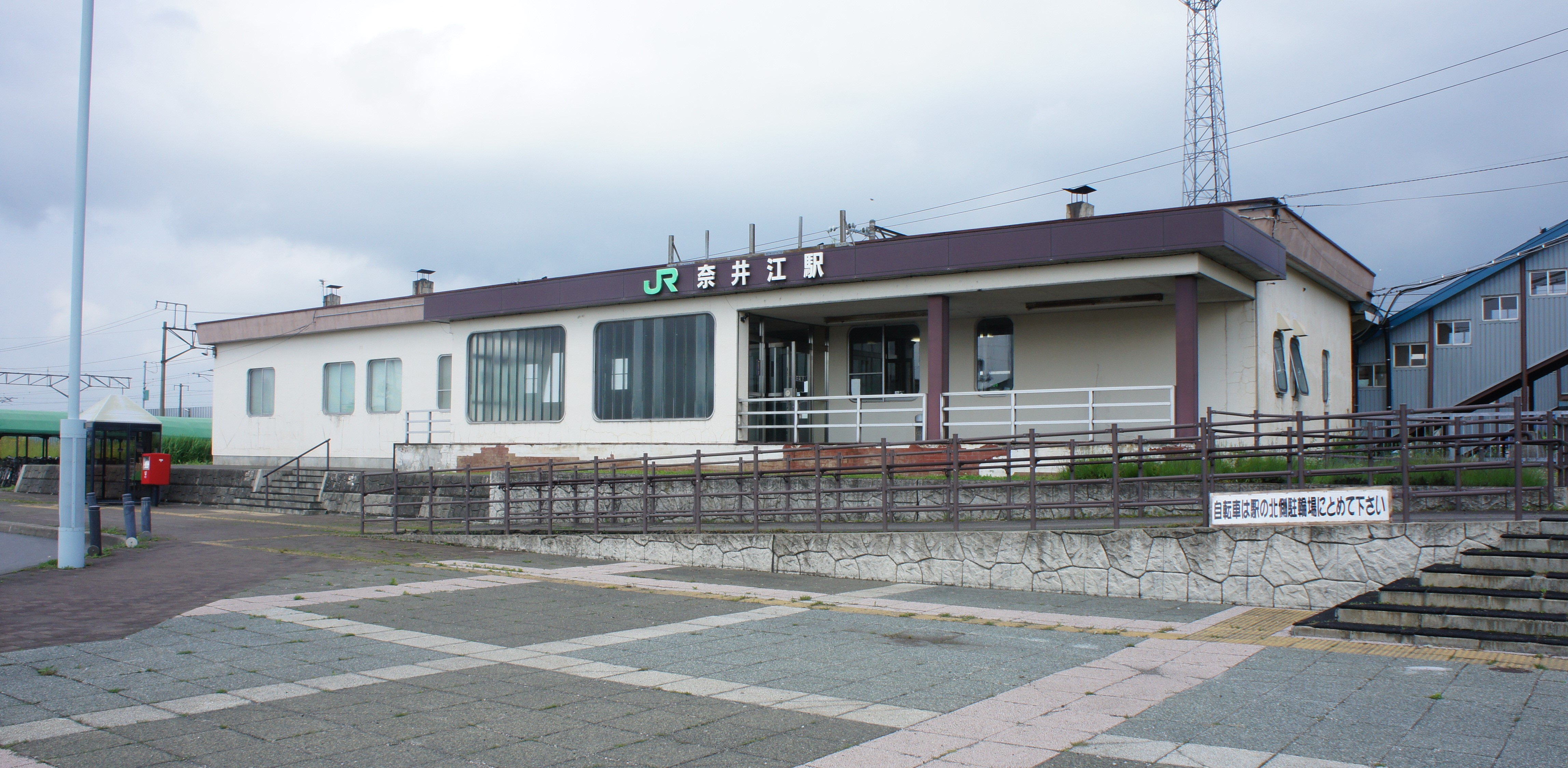 JR函館本線・奈井江駅の駅舎 Sony NEX-3